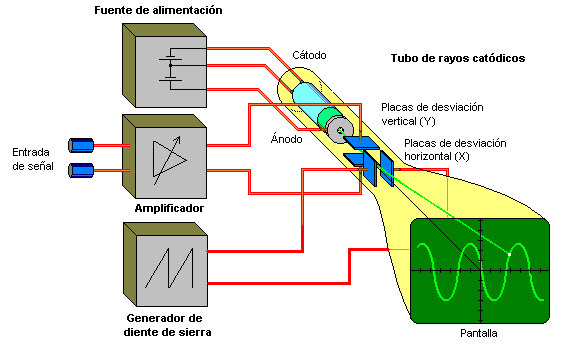 Representación esquemática de un osciloscopio Este esquema ha sido realizado por PACO a partir de la traducción y modificación del existente bajo licencia GFDL en la wiki alemana en Oszilloskopschema.PNG